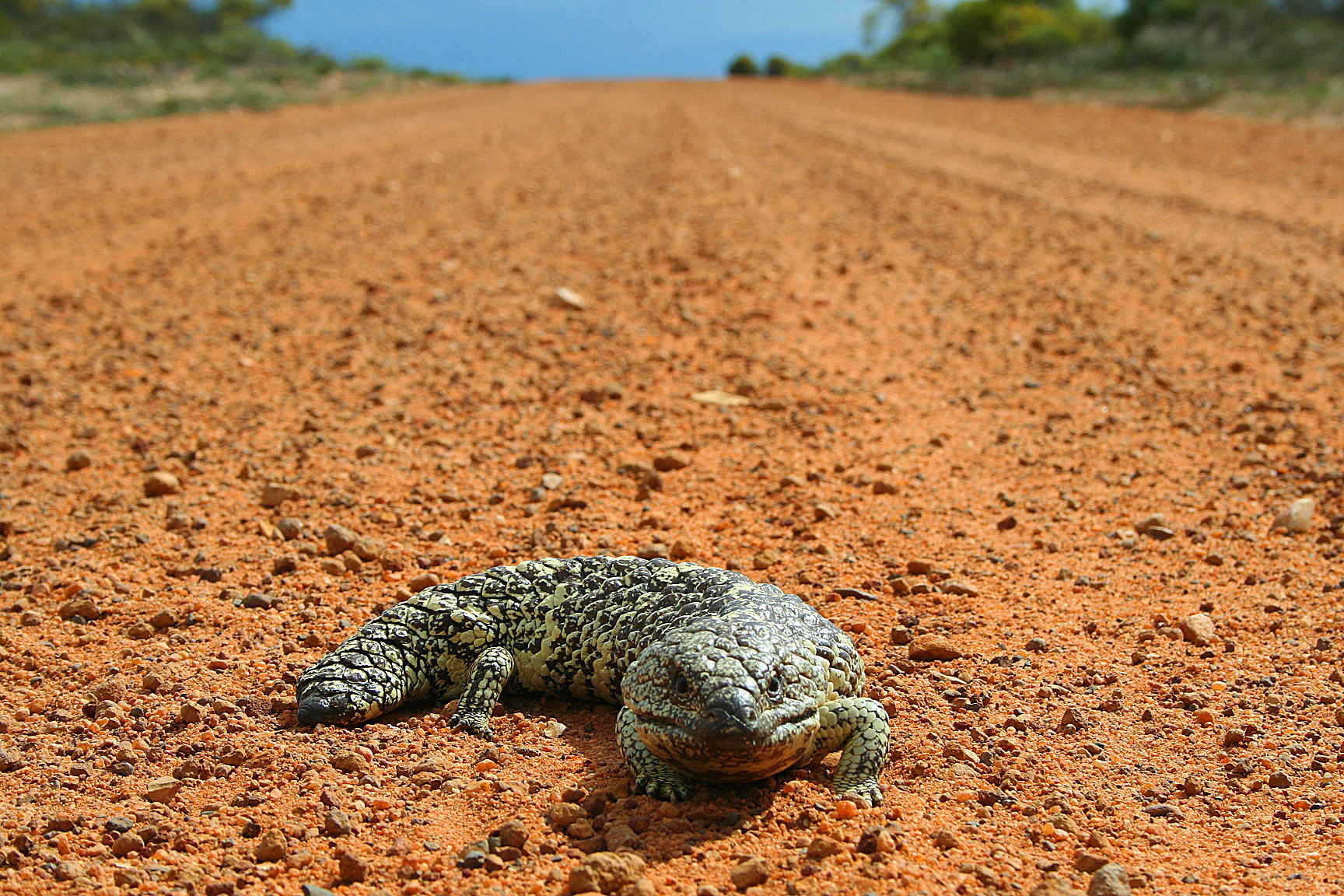 Tannenzapfenskink